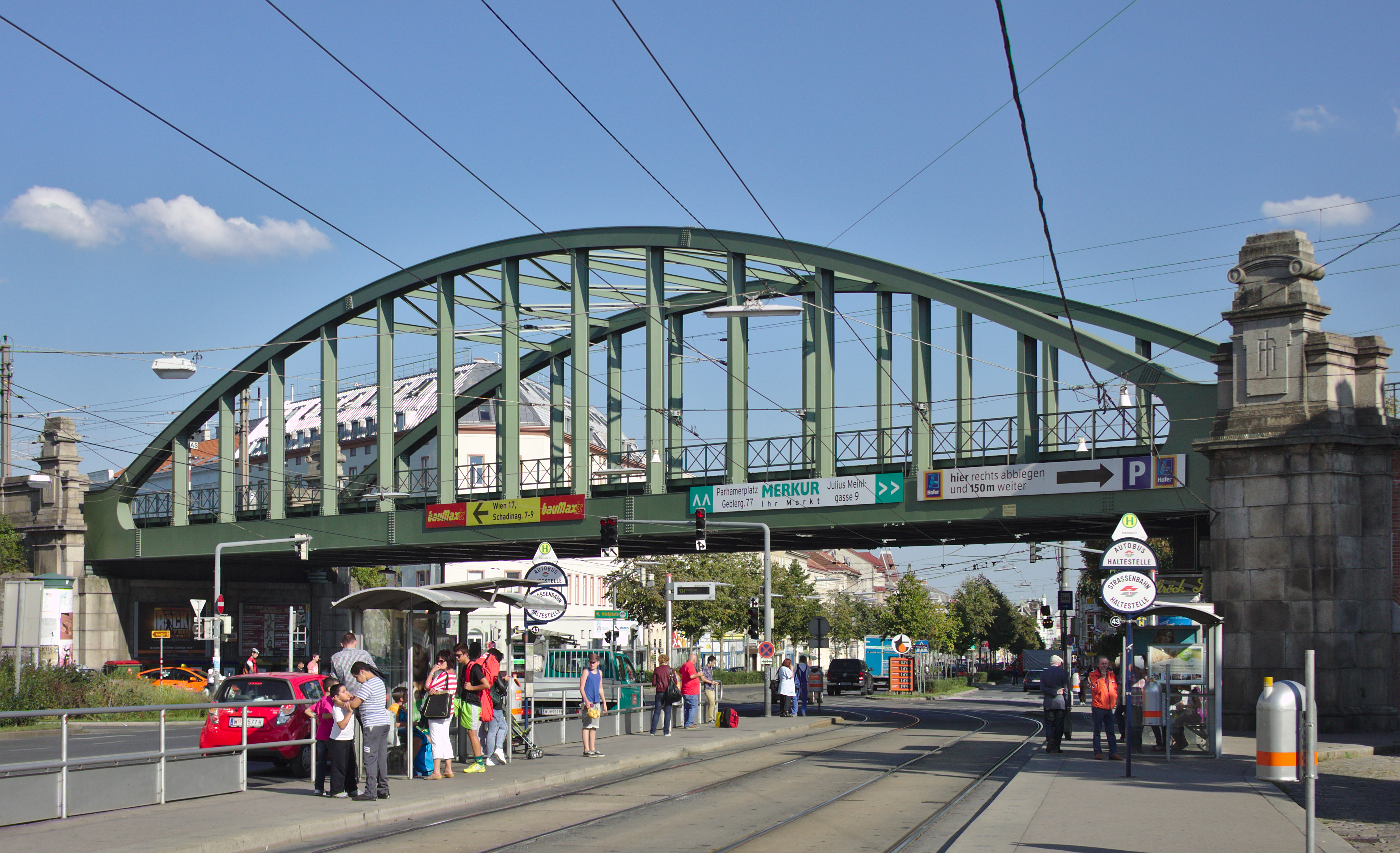 Eisenbahnstrecke, Wiener Vorortelinie - Teilbereich mit Station Hernals